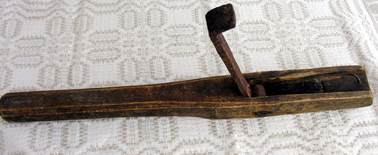 Lenktuvas 2006 m. liepos 31 d.